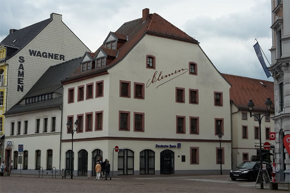 Clemenhaus